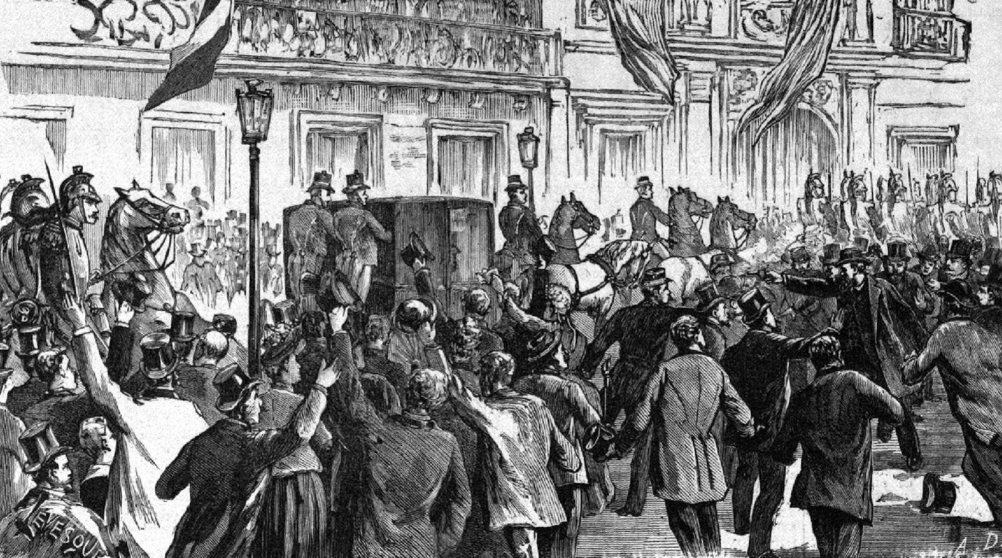 "L'attentat contre le président de la République" [le 5 mai 1889].